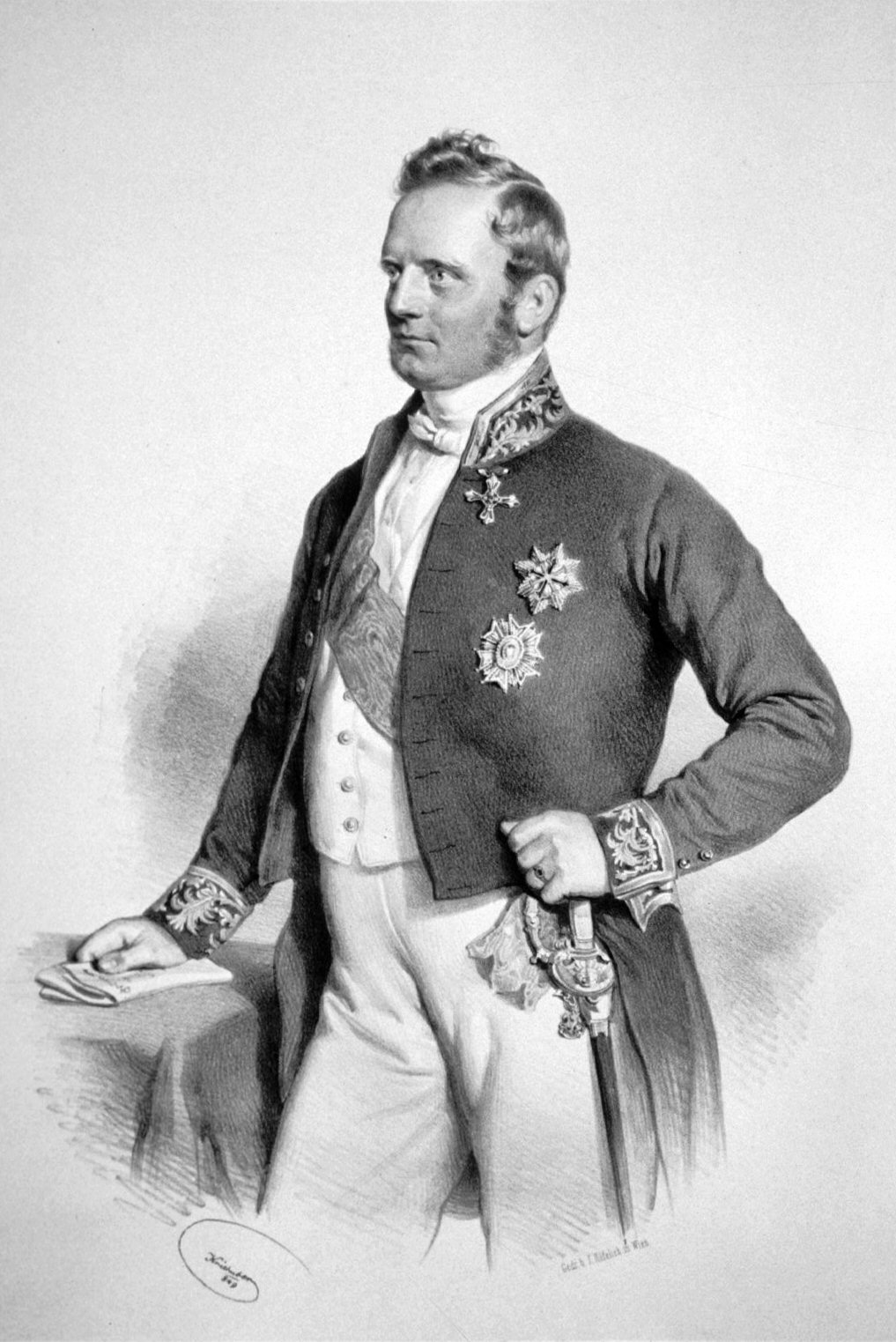 Thomas Freiherr von Ward (1819-1858), ursprünglich Reitknecht, Minister in Lucca und Parma, Diplomat. Lithographie von Josef Kriehuber, 1849